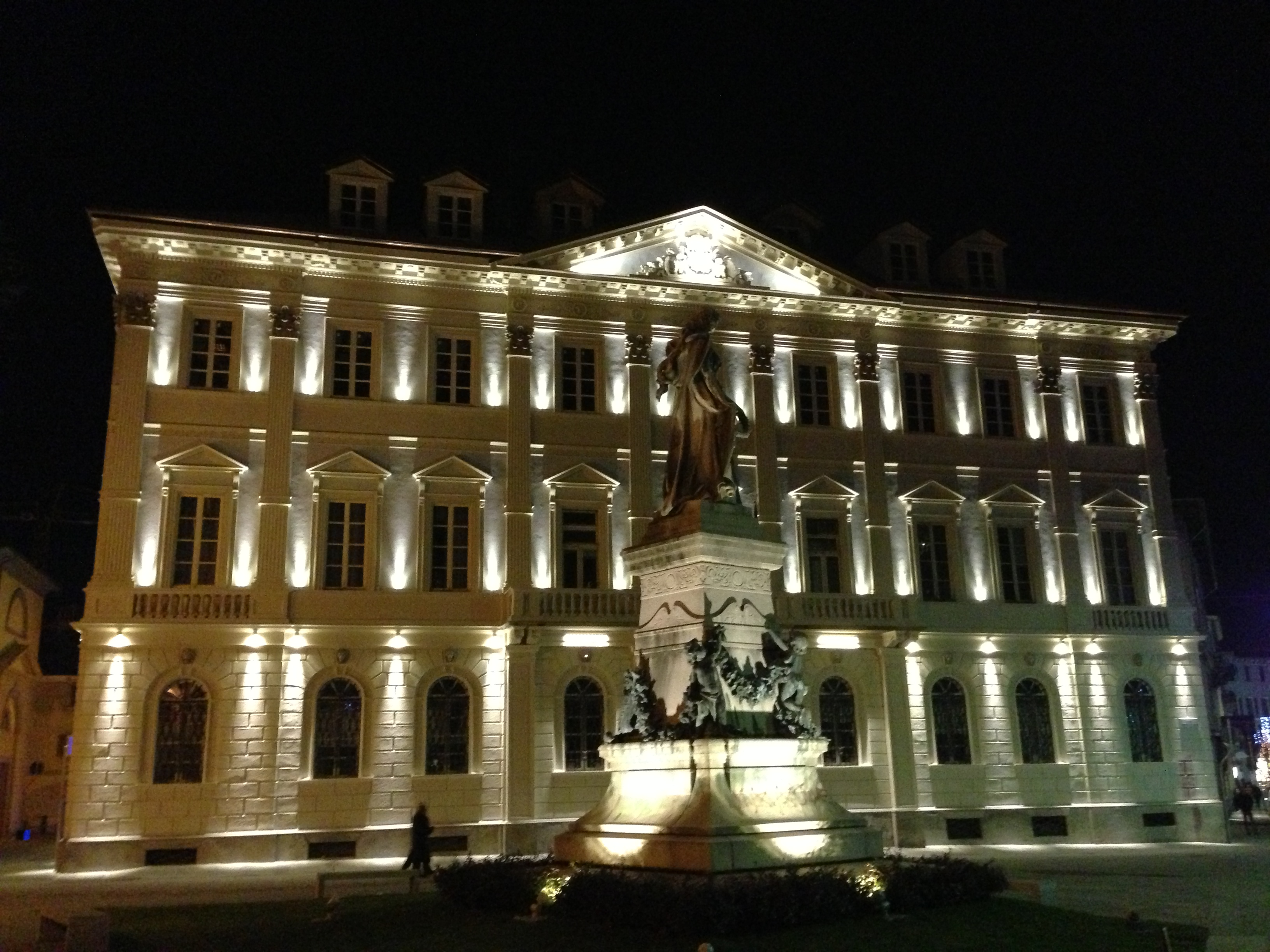 Visione notturna